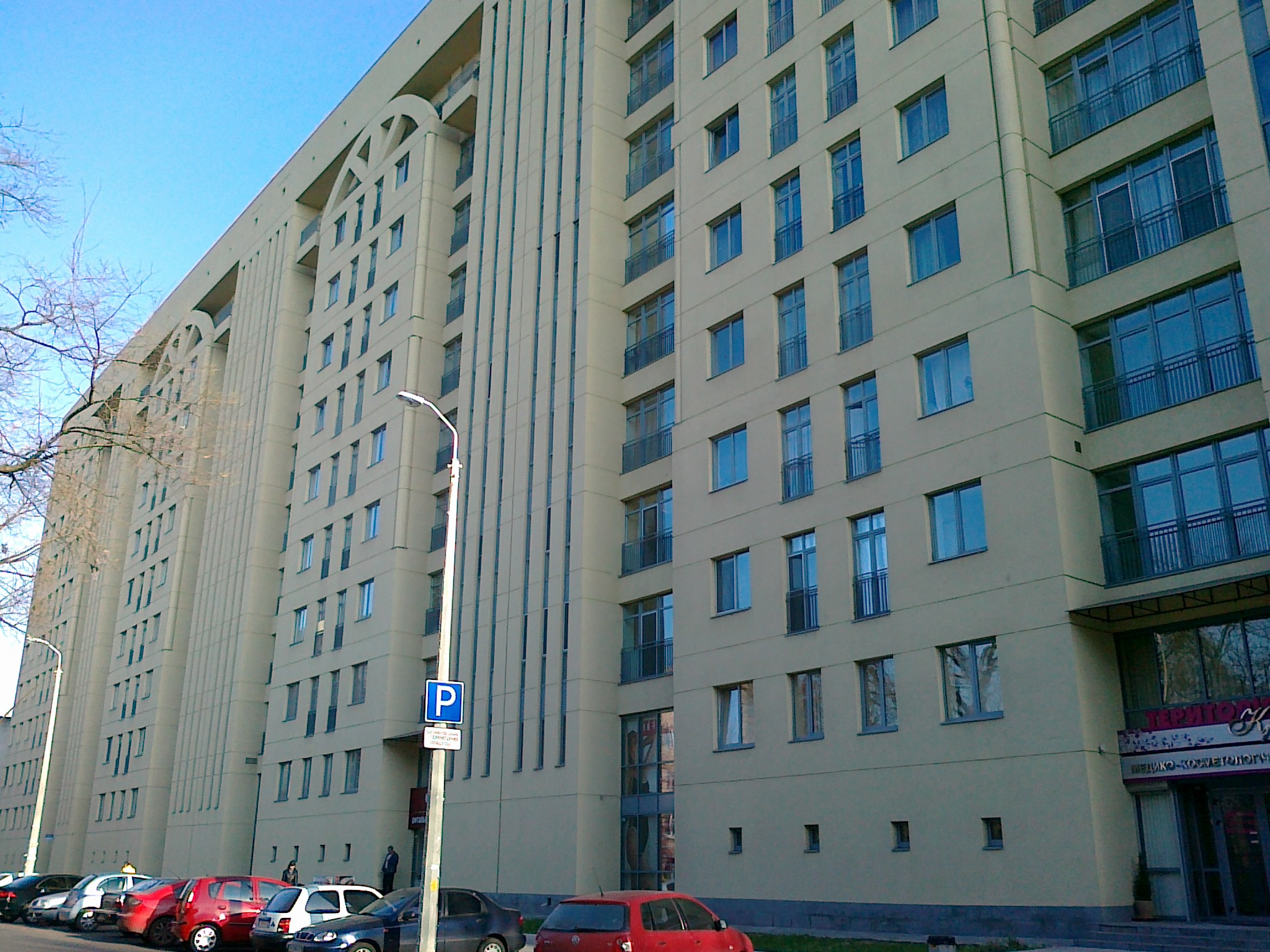 Многоэтажка на ул. Жуковского